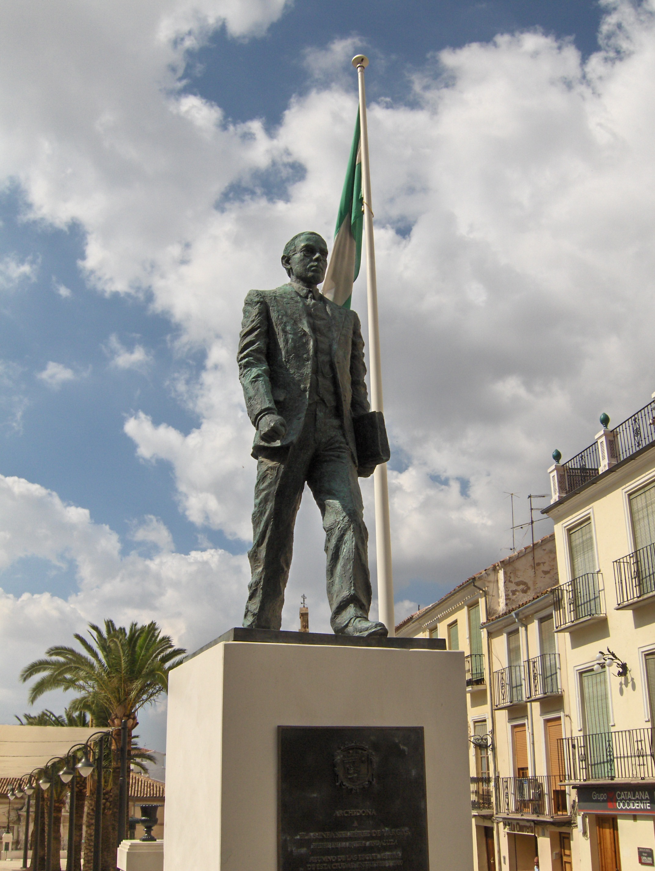 Estatua de Blas Infante en Archidona, Málaga.